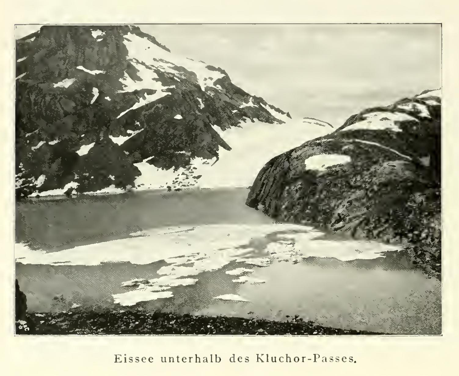 Eissee unterhalb des Kluchor-Passes.